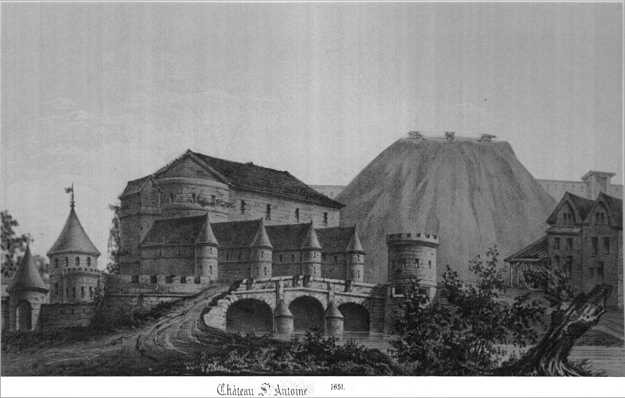 issue de Histoire de la ville de chalons et de ses monument.